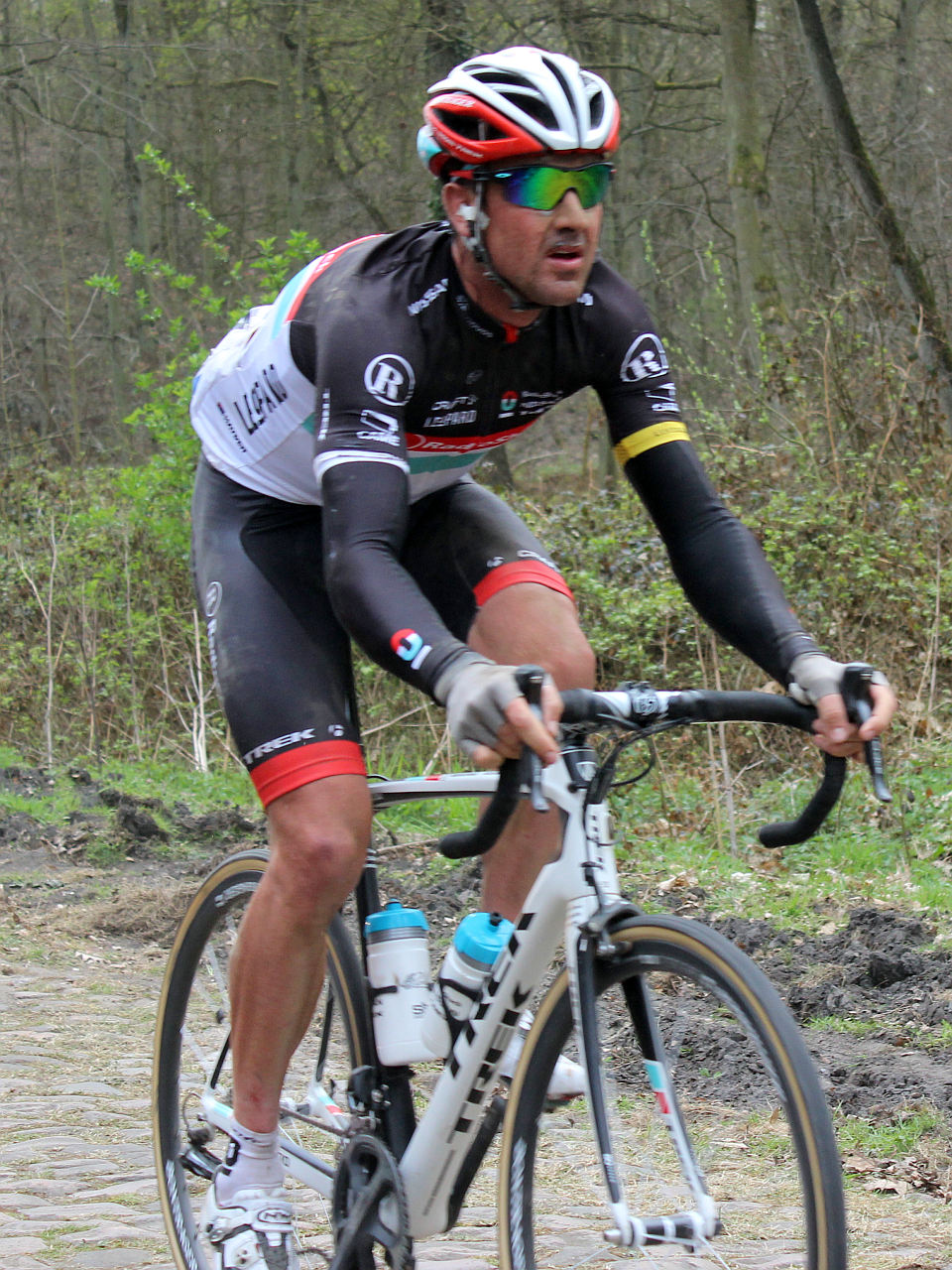 Hayden Roulston